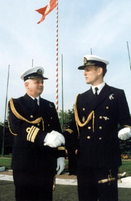 Kmdr por. pilot Stanisław Pietraszkiewicz, dowódca 1. Puckiego Dywizjonu Lotniczego Marynarki Wojennej (z lewej) i jego następca na tym stanowisku kmdr ppor Czesław Bielawski.